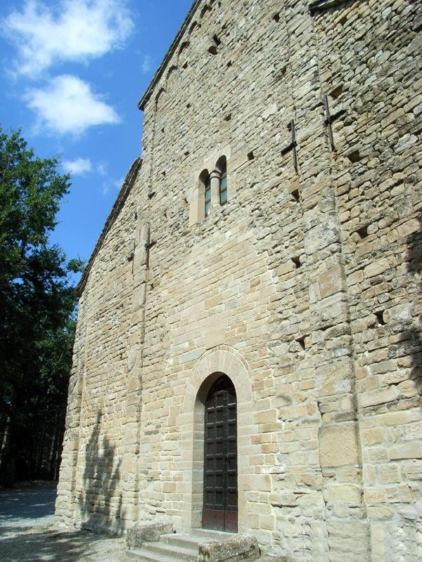 Vista esterna della facciata di Pieve di Sasso - Neviano degli Arduini